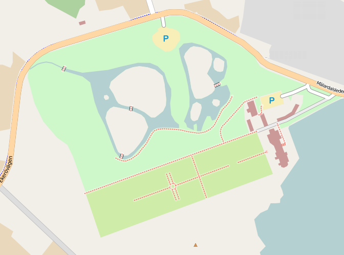 Karta af Drotningholma